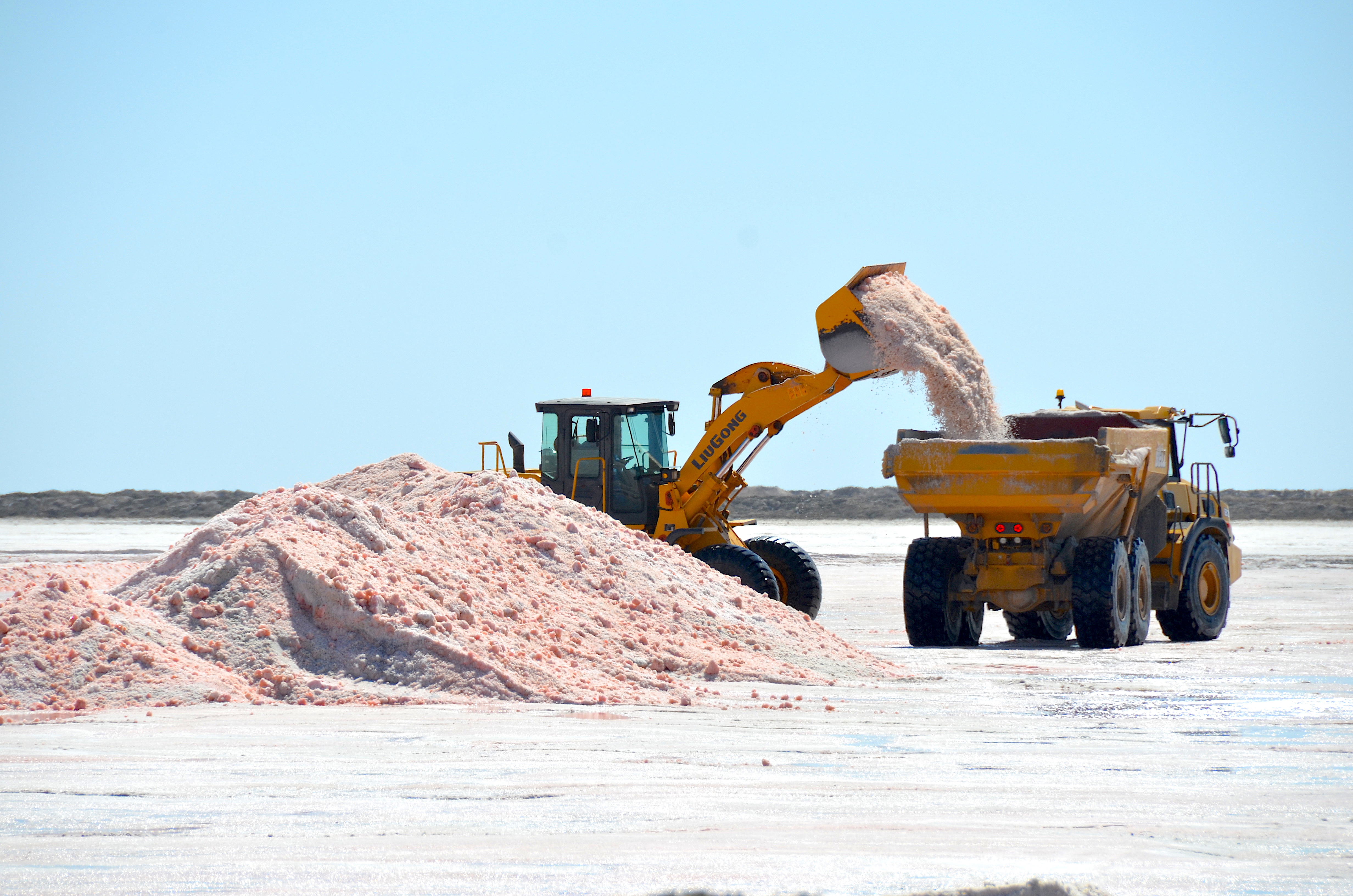 Meersalz-Verladung am Salzbecken in Walvis Bay (2014)